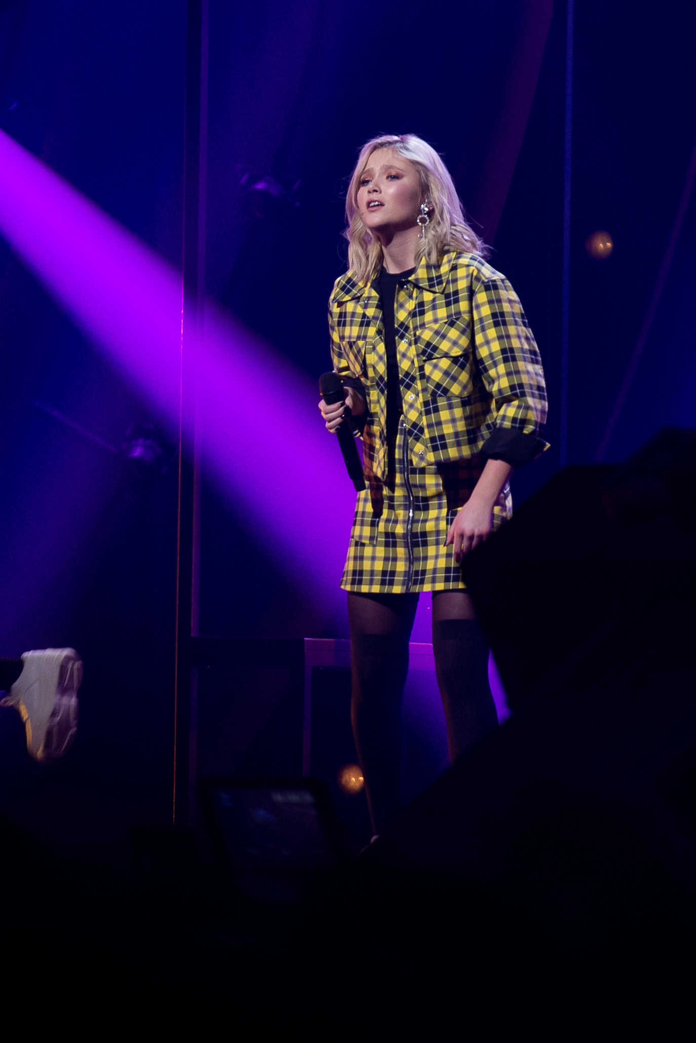 Malou Prytz, Melodifestivalen 2019, Final, Friends Arena, Solna